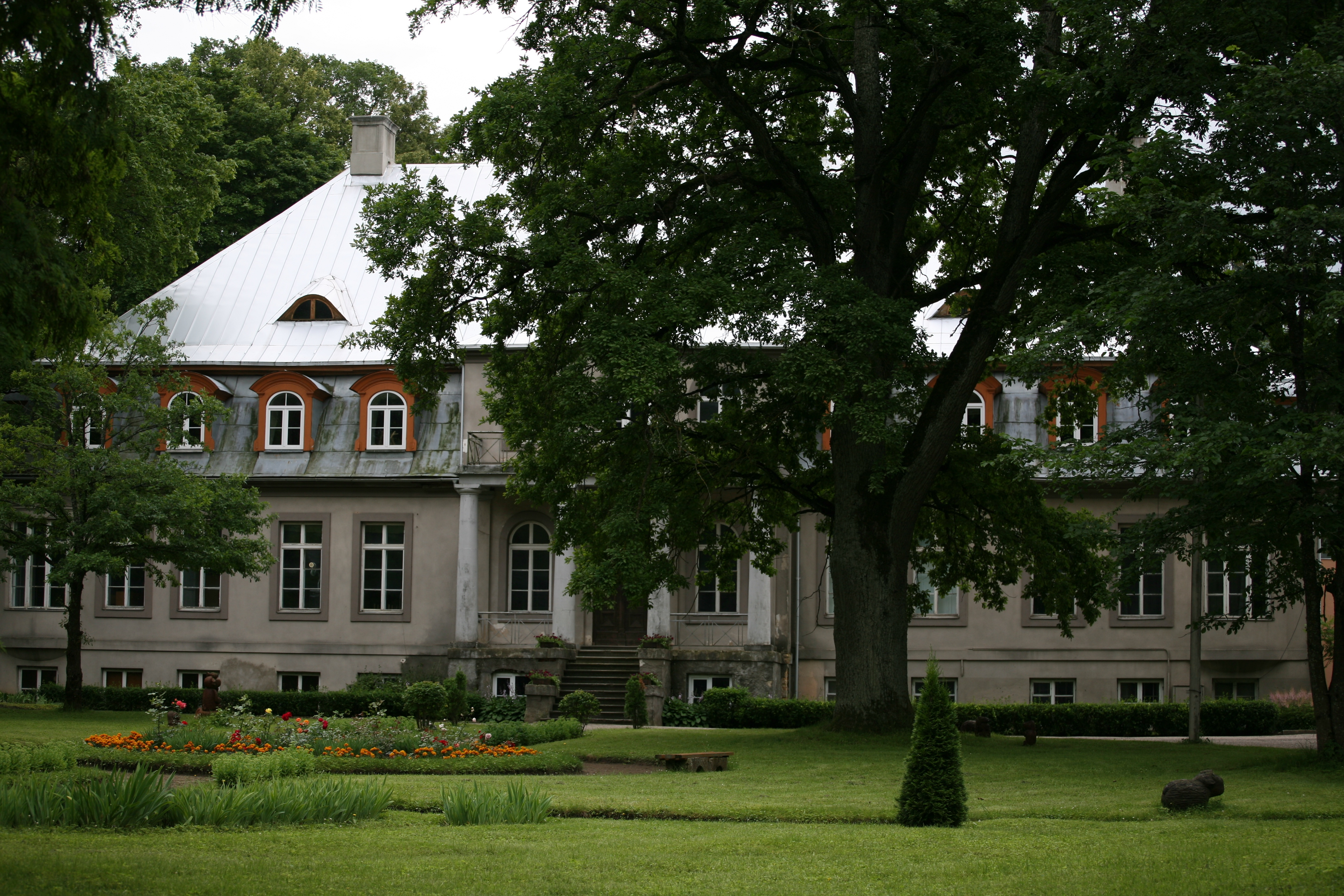 Vadakstes muiža